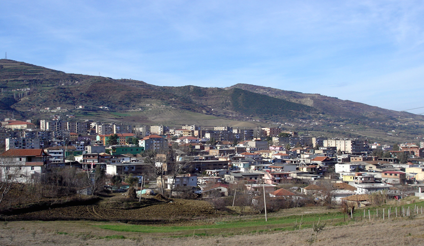 Ballsh Mallakaster